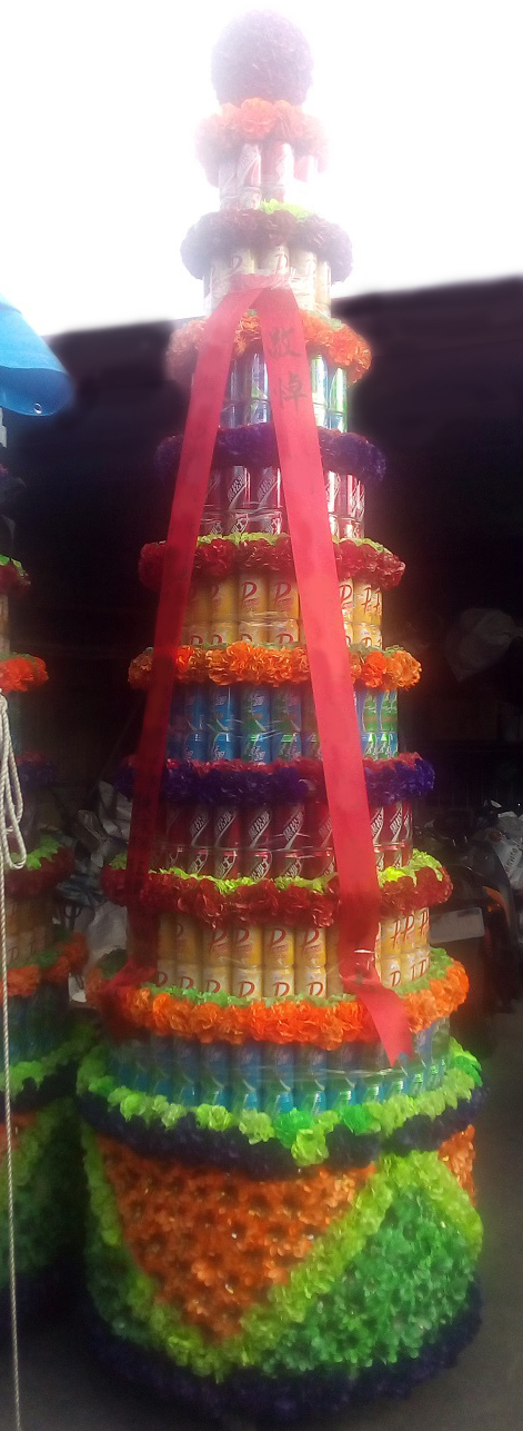 九層罐頭塔，完全以飲料罐堆成。